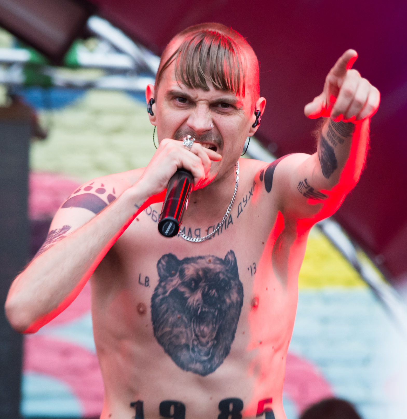 Илья Прусикин (группа Little Big) на Видфест 2016 в Санкт-Петербурге